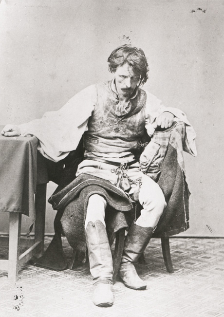 Modell a Siralomház-hoz, a főalak: az elítélt